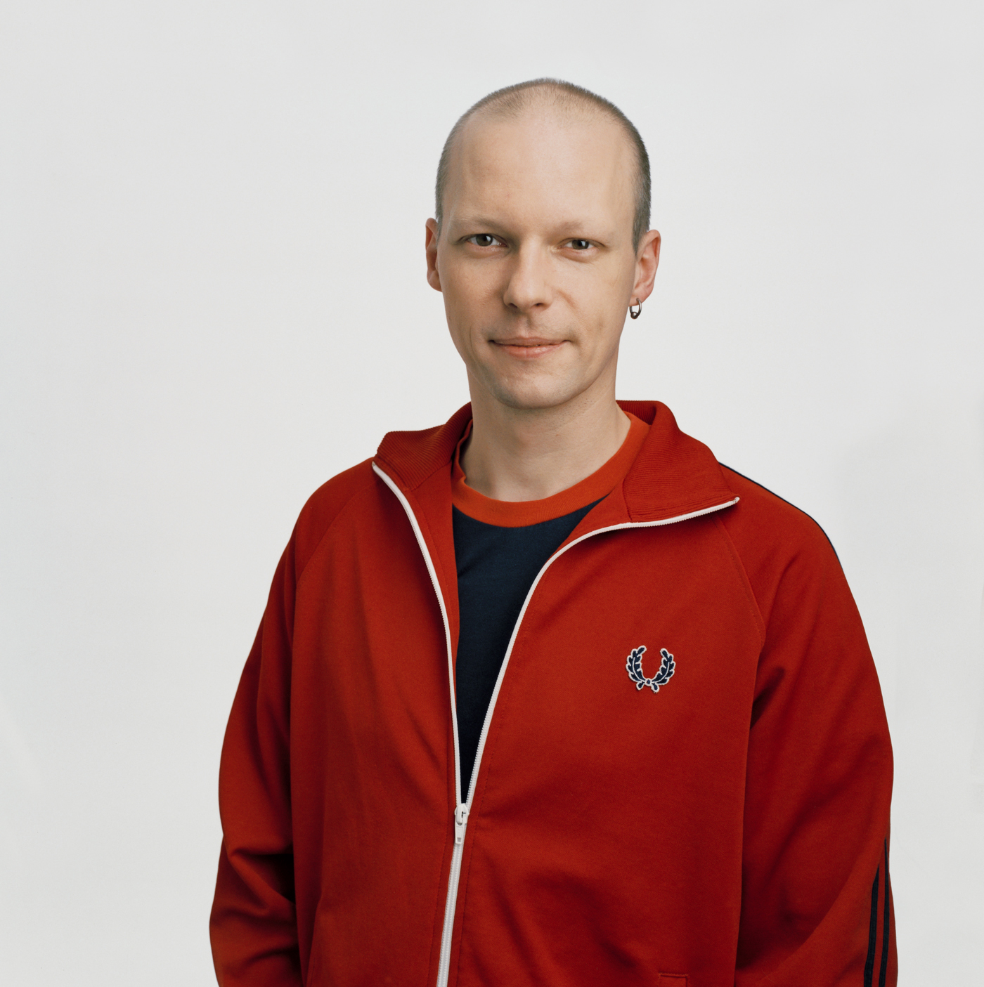 Marco Schreuder. Wiener Landtagsabgeordnete und Mitglied des Wiener Gemeinderats (Die Grünen)